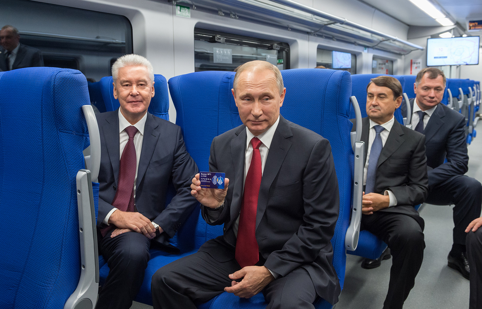 Владимир Путин и Сергей Собянии в салоне электропоезда ЭС2Г на открытии МЦК